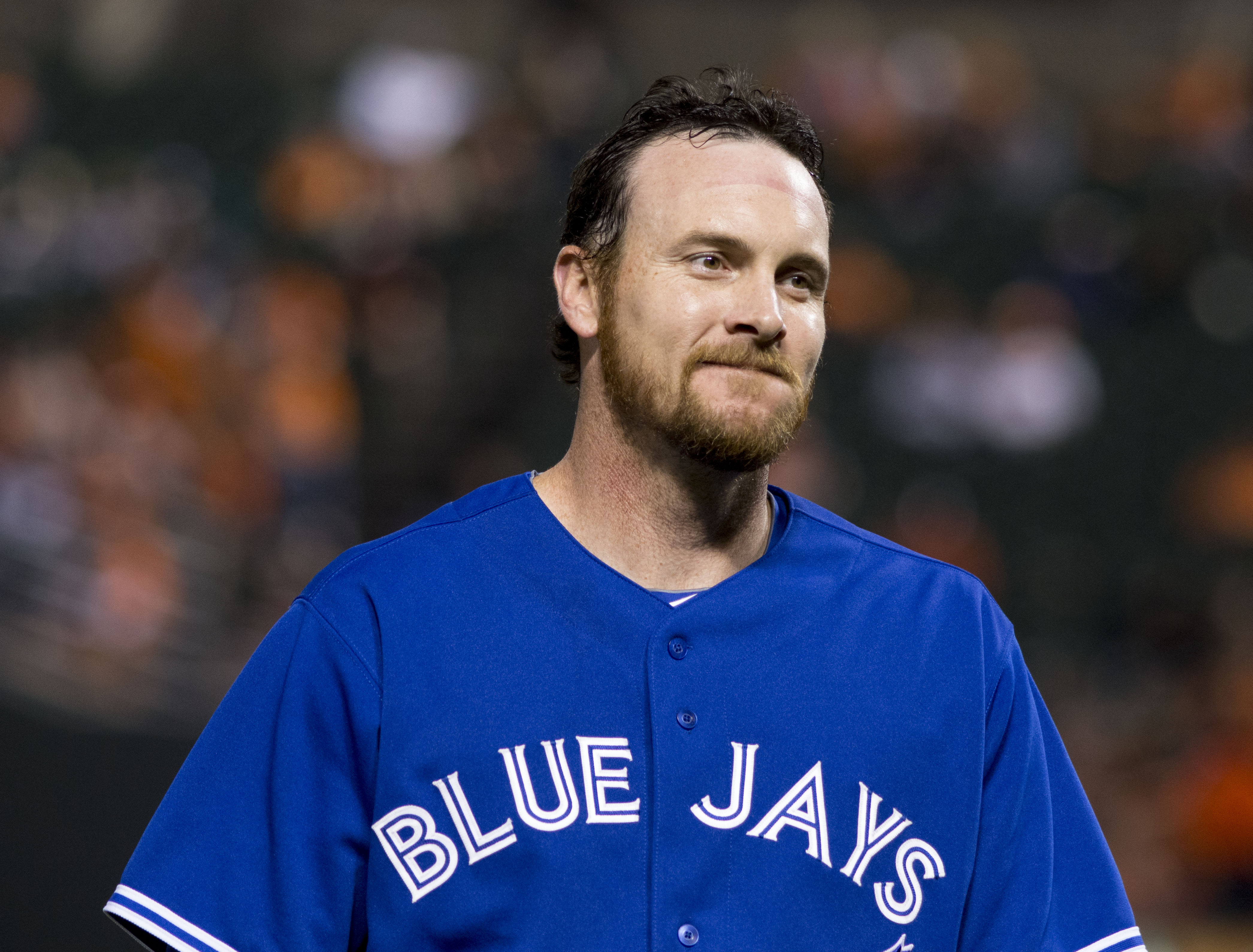 Ryan Langerhans